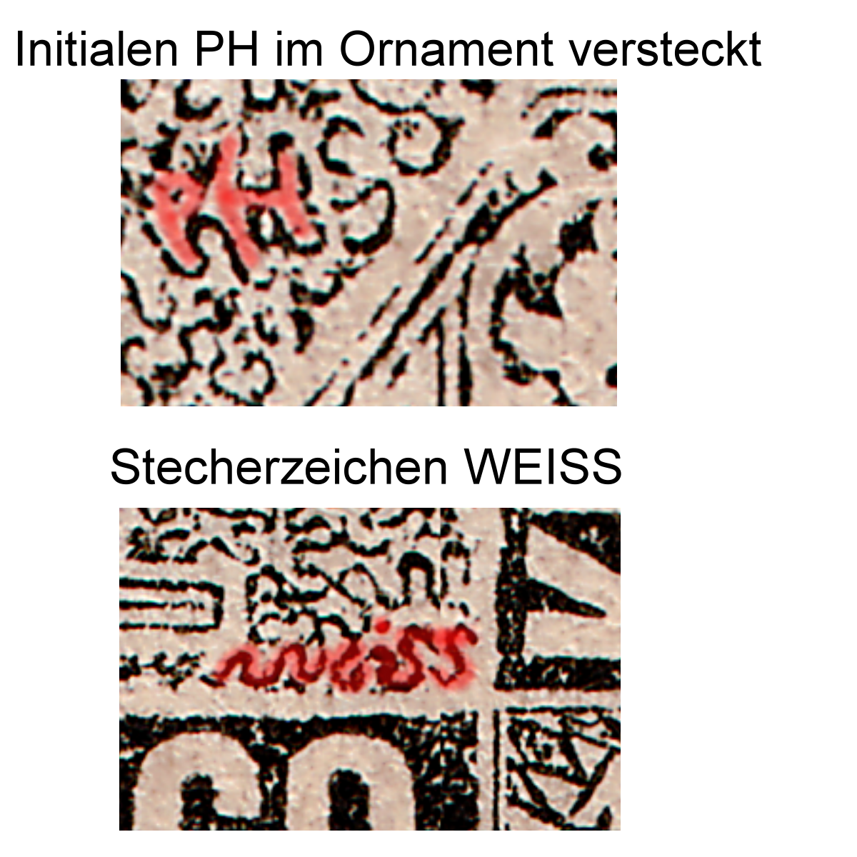 Details Schwarzer Einser PH und WEISS